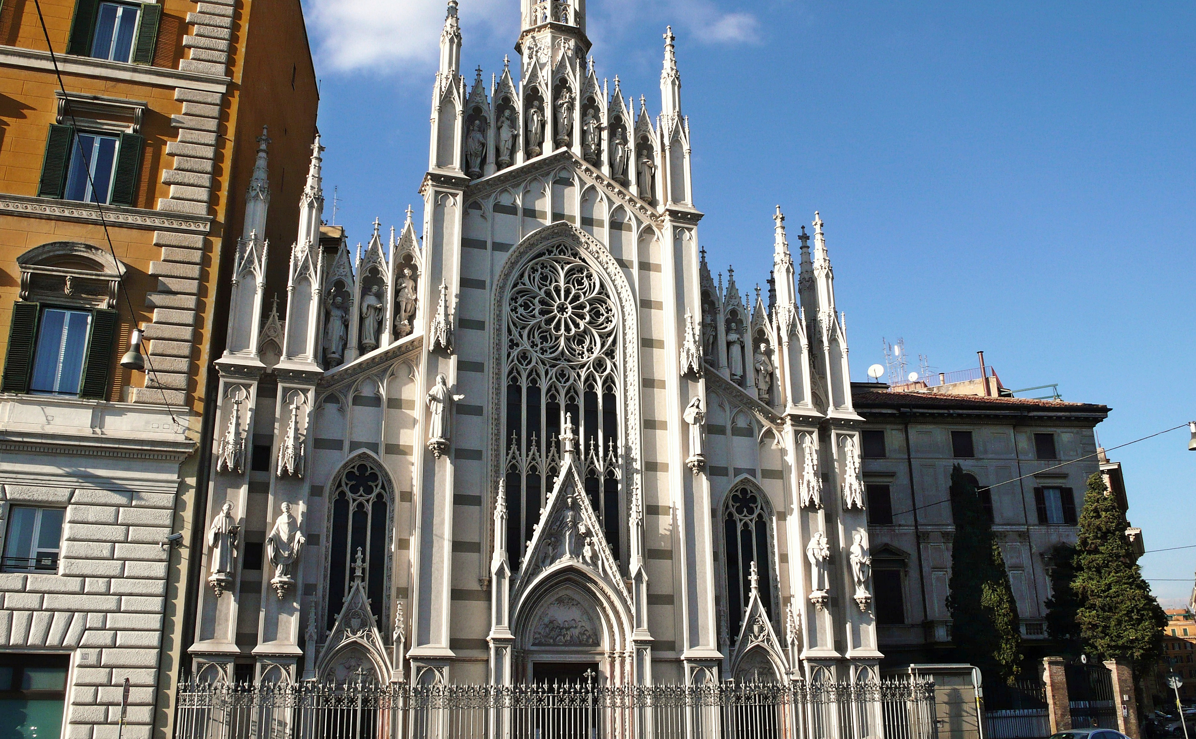 roma